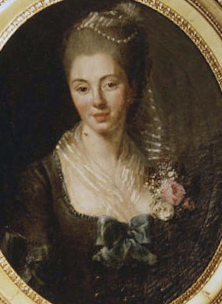 Portrait de Marie-Louise Sémen de Brémond, épouse de Jacques II, marquis du Puy-Montbrun